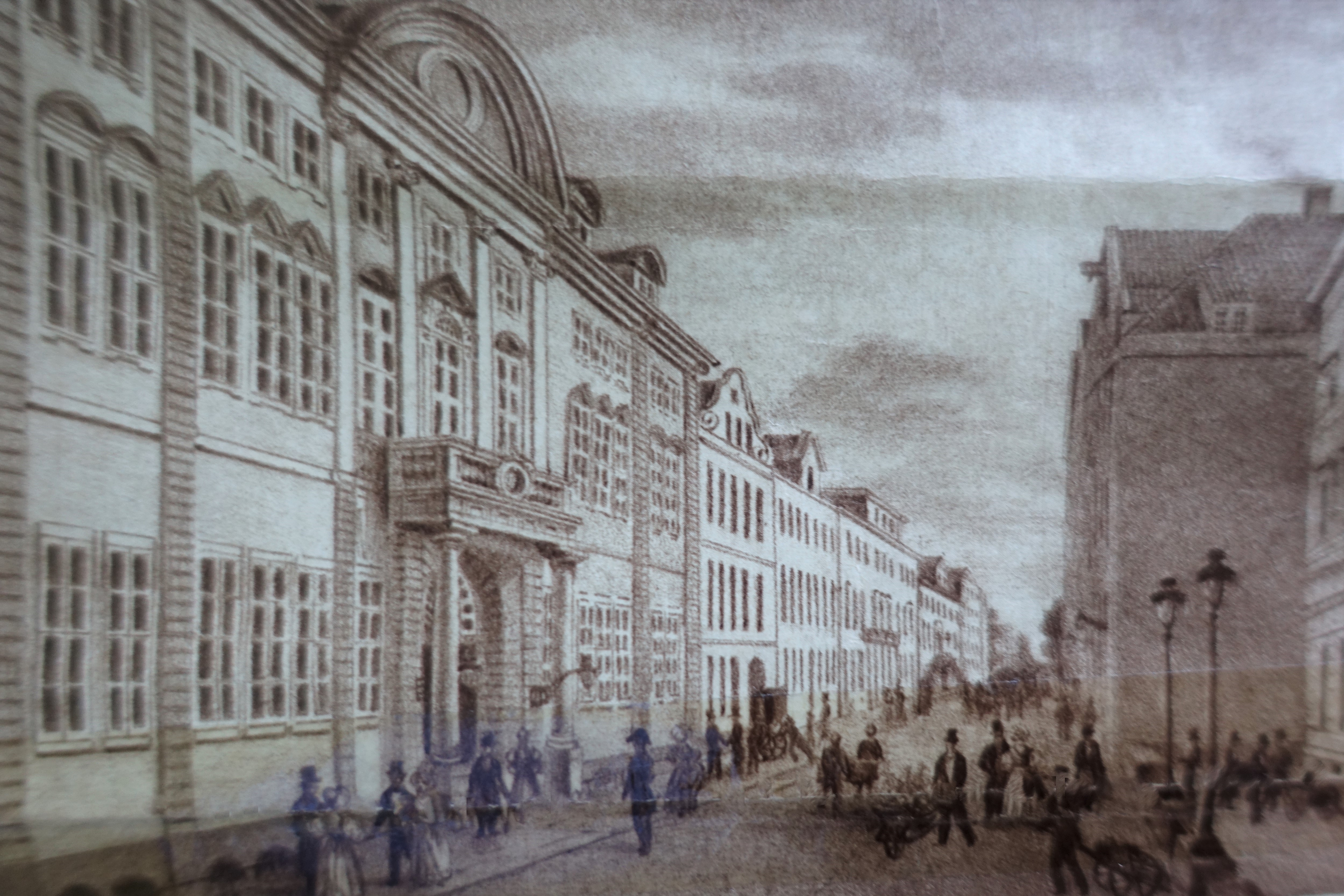 Görtz-Palais um 1840